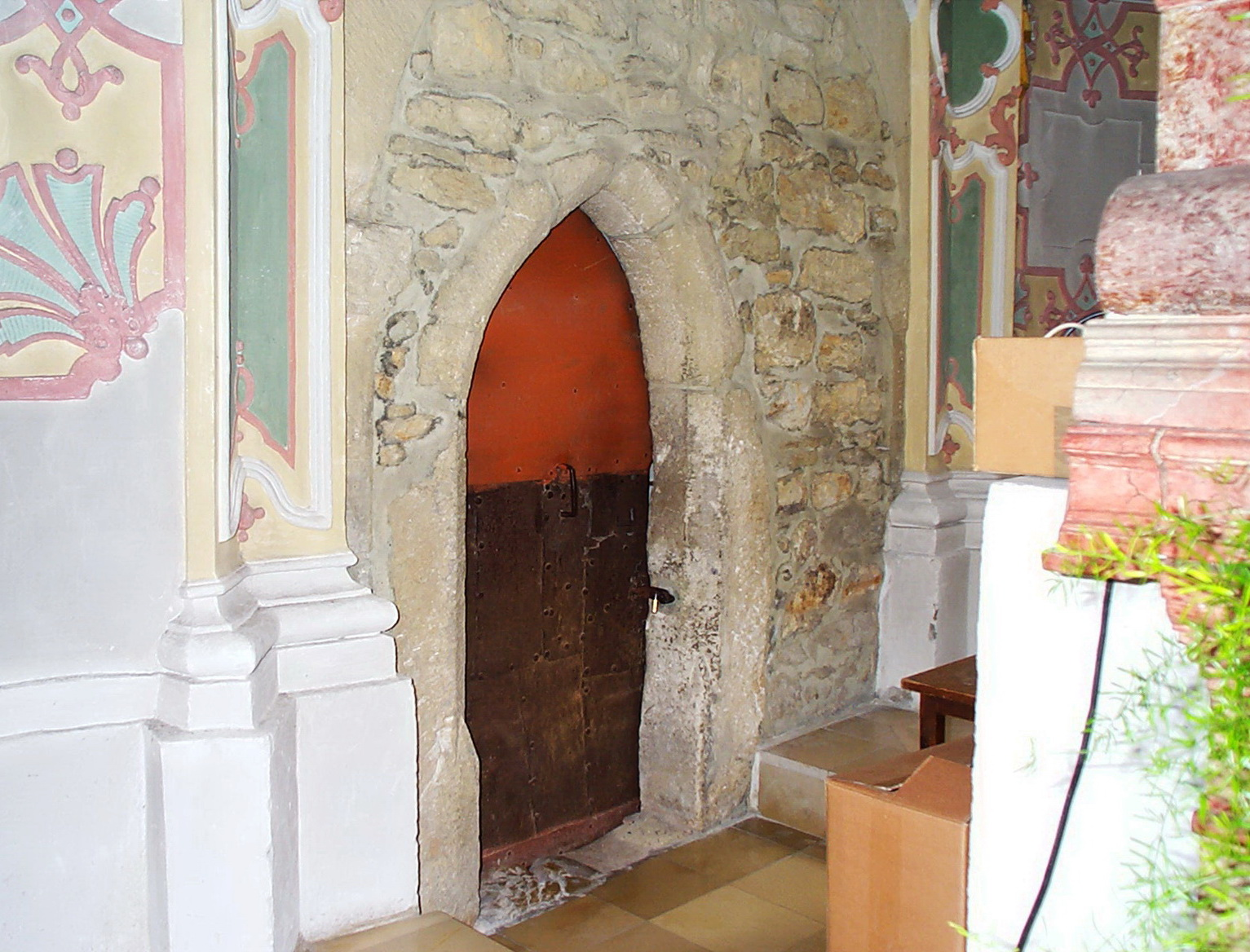 Langquaid Marktplatz 14. Katholische Pfarrkirche St. Jakob d. Ä. Saalkirche mit Steildach, eingezogenem Rechteckchor und Chorscheitelturm, Portalvorhalle nach Süden, Chor und Turm im Kern romanisch, 13. Jahrhundert, Langhaus spätgotisch, 15. Jahrhundert, Barockisierung der Anlage um 1740, Verlängerungen nach Westen, 1917 und 2004; mit Ausstattung; Hinter dem Hochaltar, spitzbogiger Eingang zum Turmaufgang.